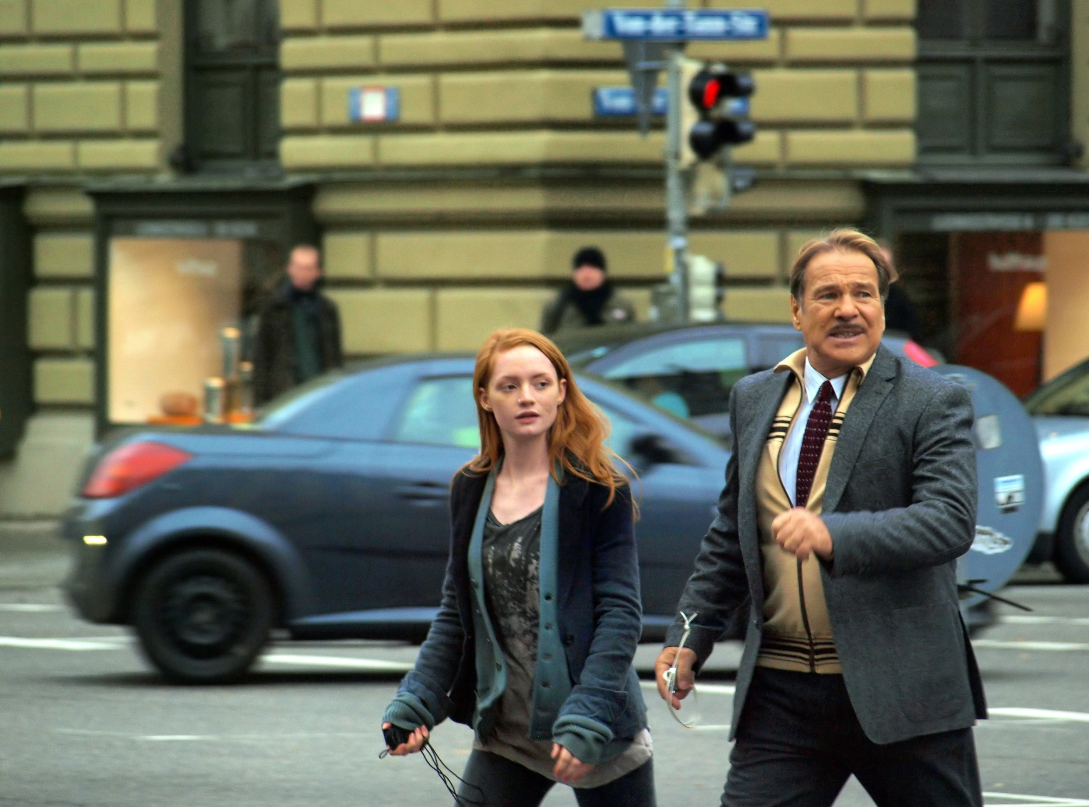 Götz George and Janina Stopper while while filming "Papa allein zu Haus" (working title: "Nur die Guten sterben jung") in Munich